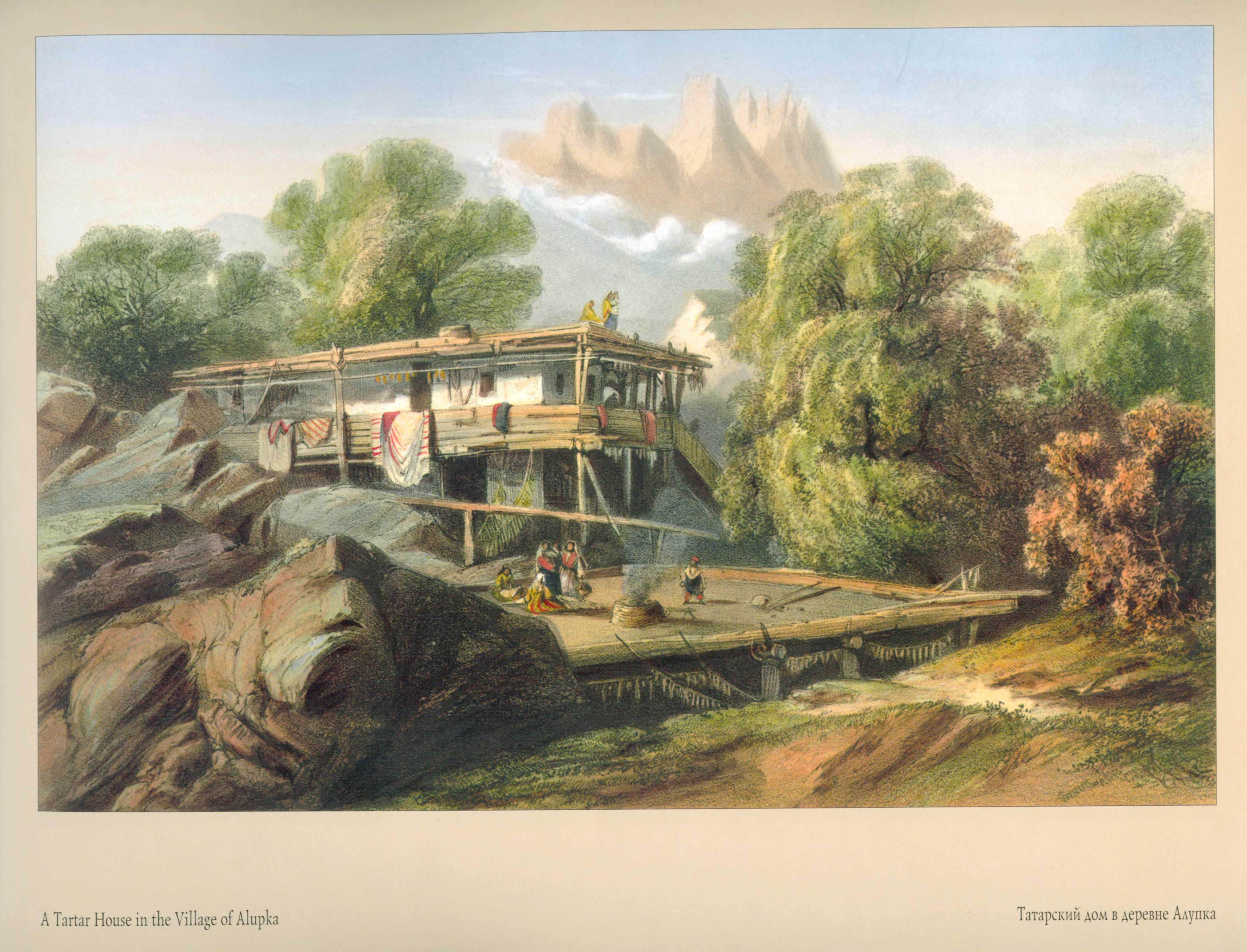 Карло Боссоли. Татарский дом в деревне Алупка